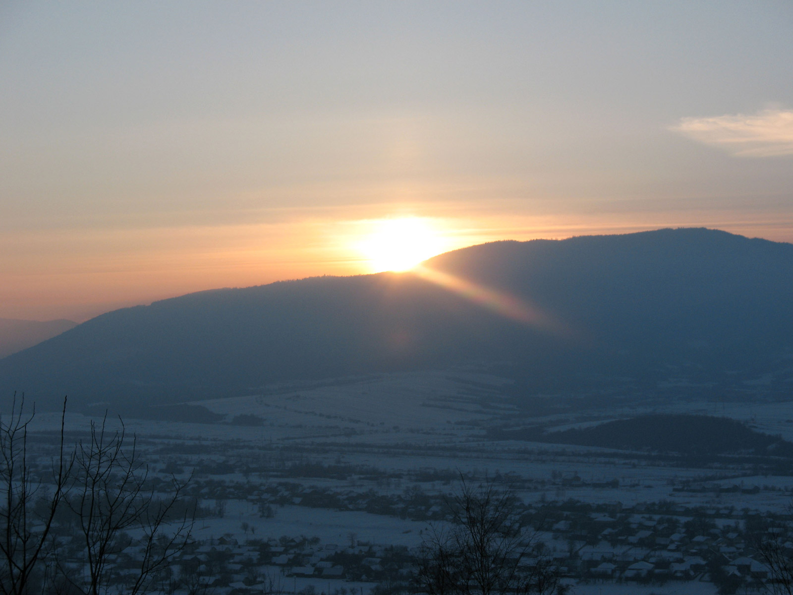 Шевченкове взимку. Вид з гори Крем'янець (вдалині гора Лиса)